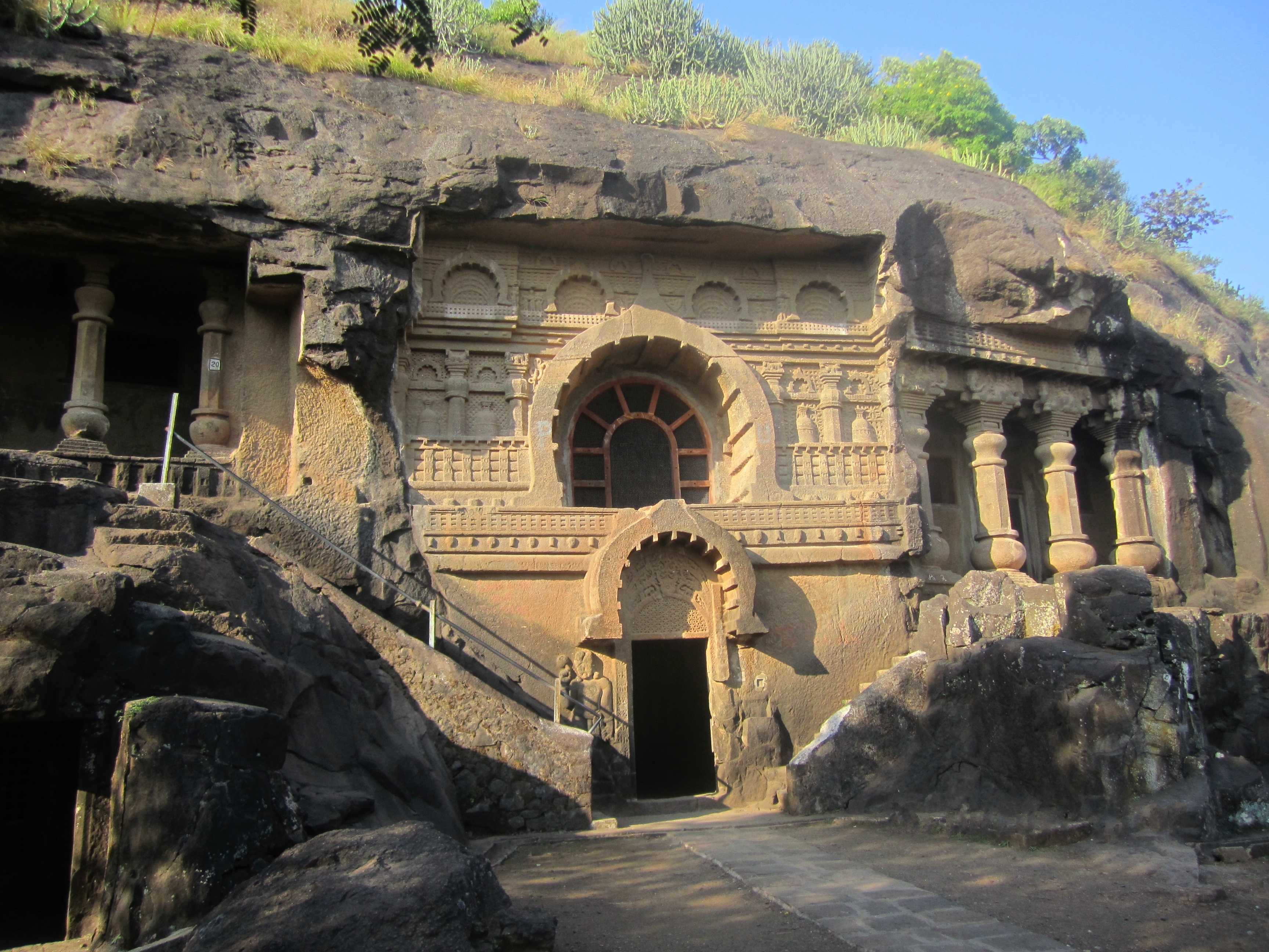 Pandavleni Caves Nashik India